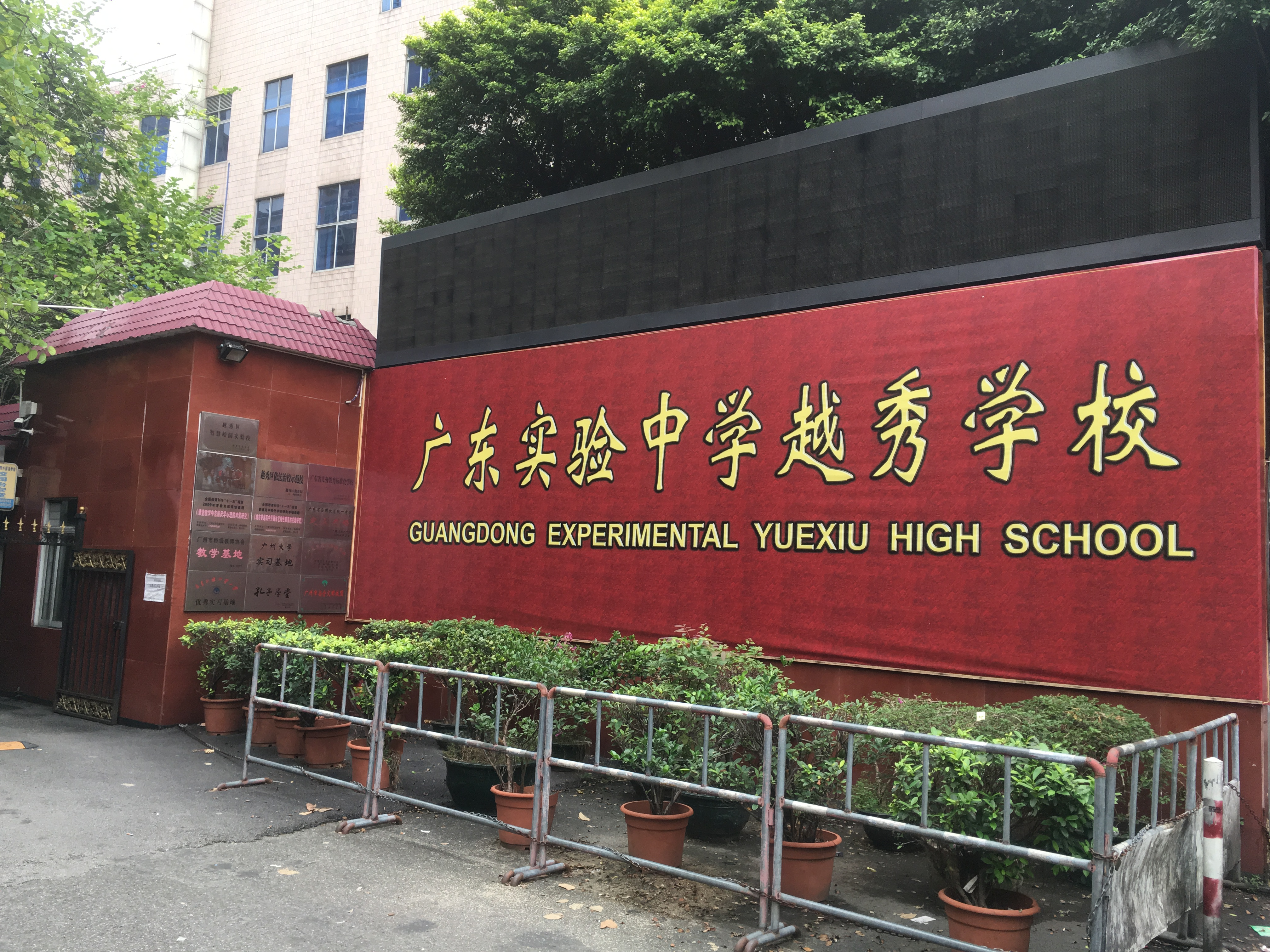 中文（香港）: 廣東實驗中學越秀學校桂花校區